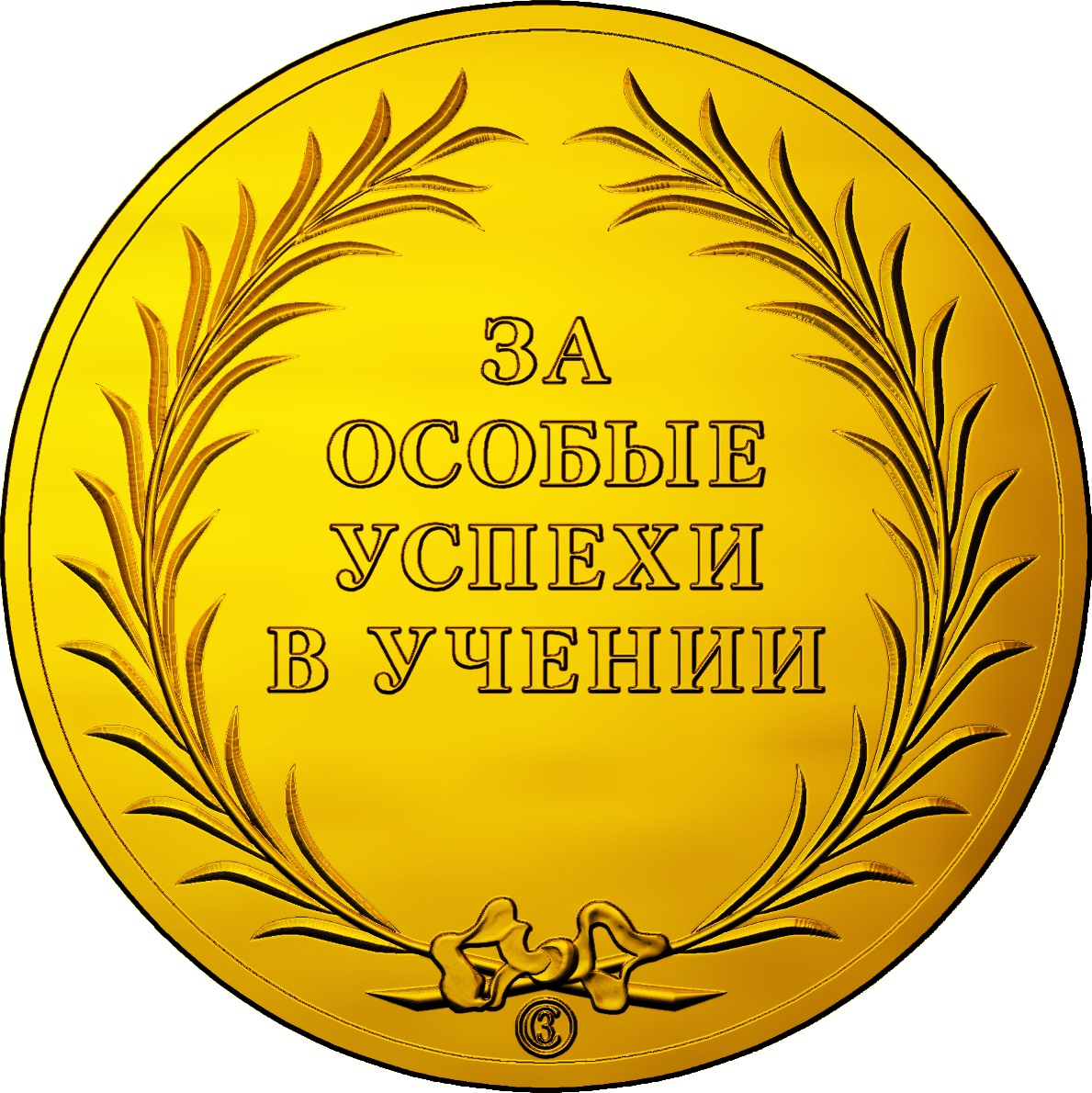 Школьная медаль образца 2014 года (реверс)